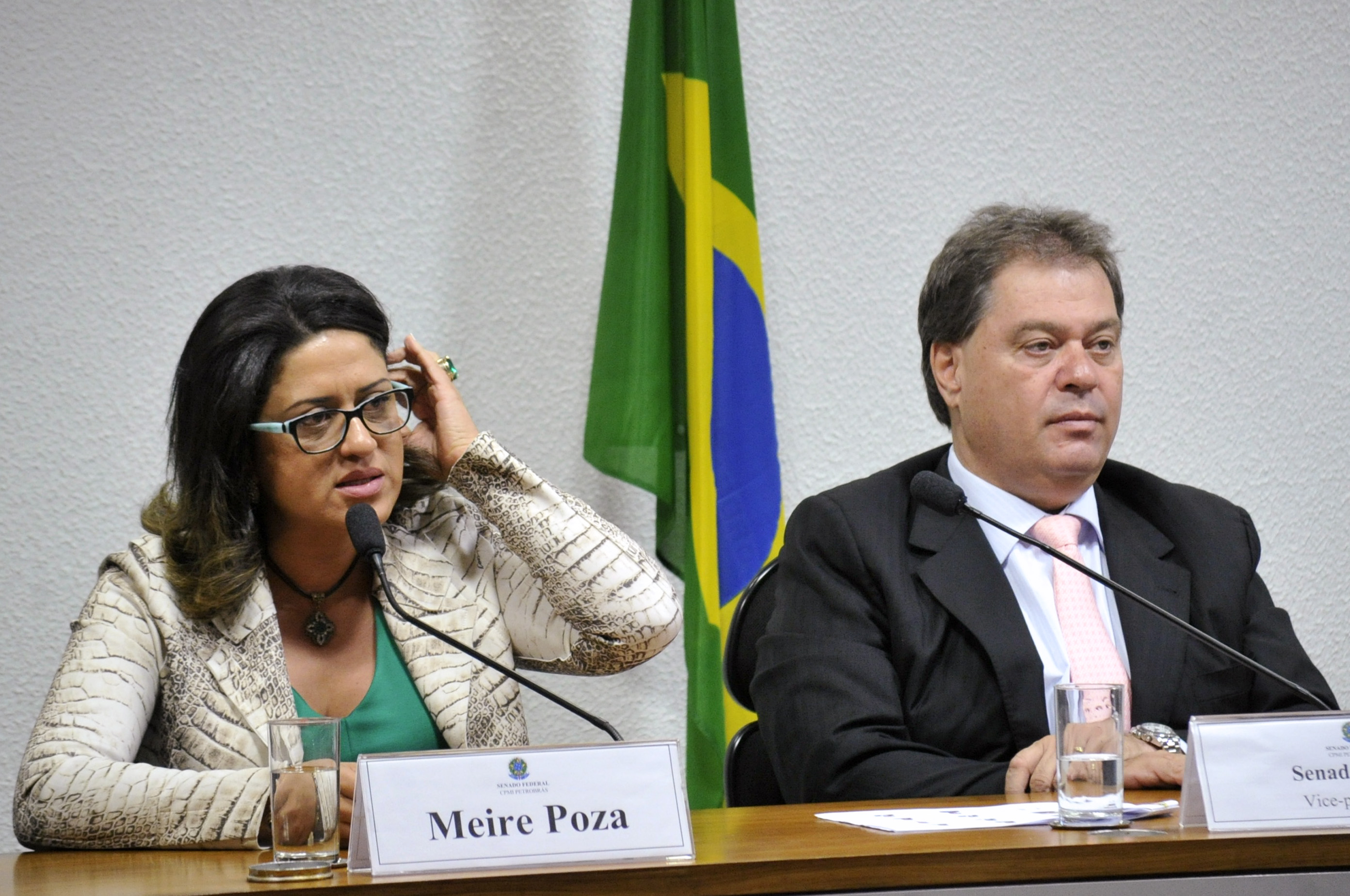 Sala de comissões do Senado Federal durante reunião da Comissão Parlamentar Mista de Inquérito (CPMI) que investiga denúncias de irregularidades na Petrobras. A profissional que trabalhava diretamente com o doleiro Alberto Youssef, contadora Meire Bonfim Poza, é ouvida na comissão. (E/D): contadora Meire Bonfim Poza; vice-presidente da comissão, senador Gim (PDT-DF) Foto: Geraldo Magela/Agência Senado